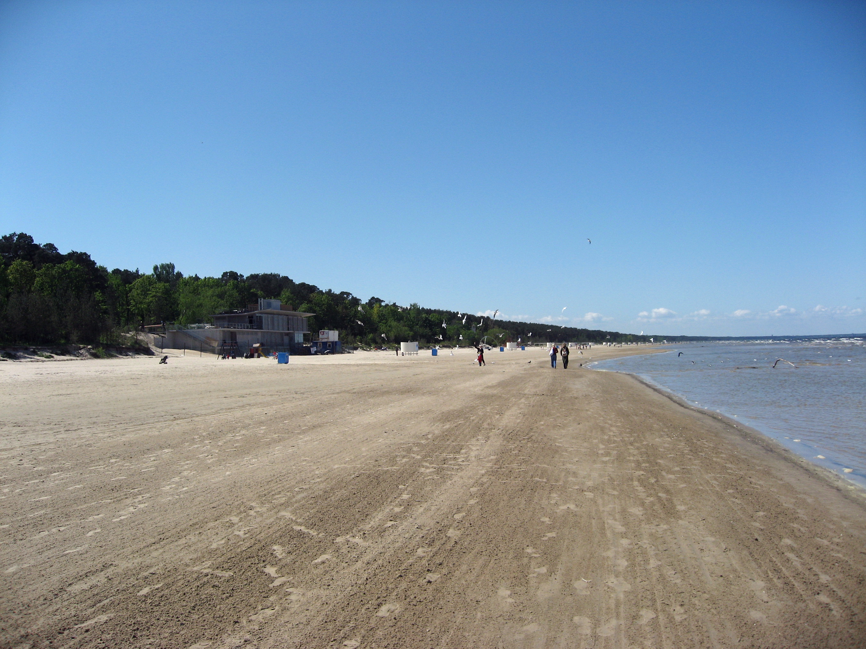 Jūrmala, pláž a moře